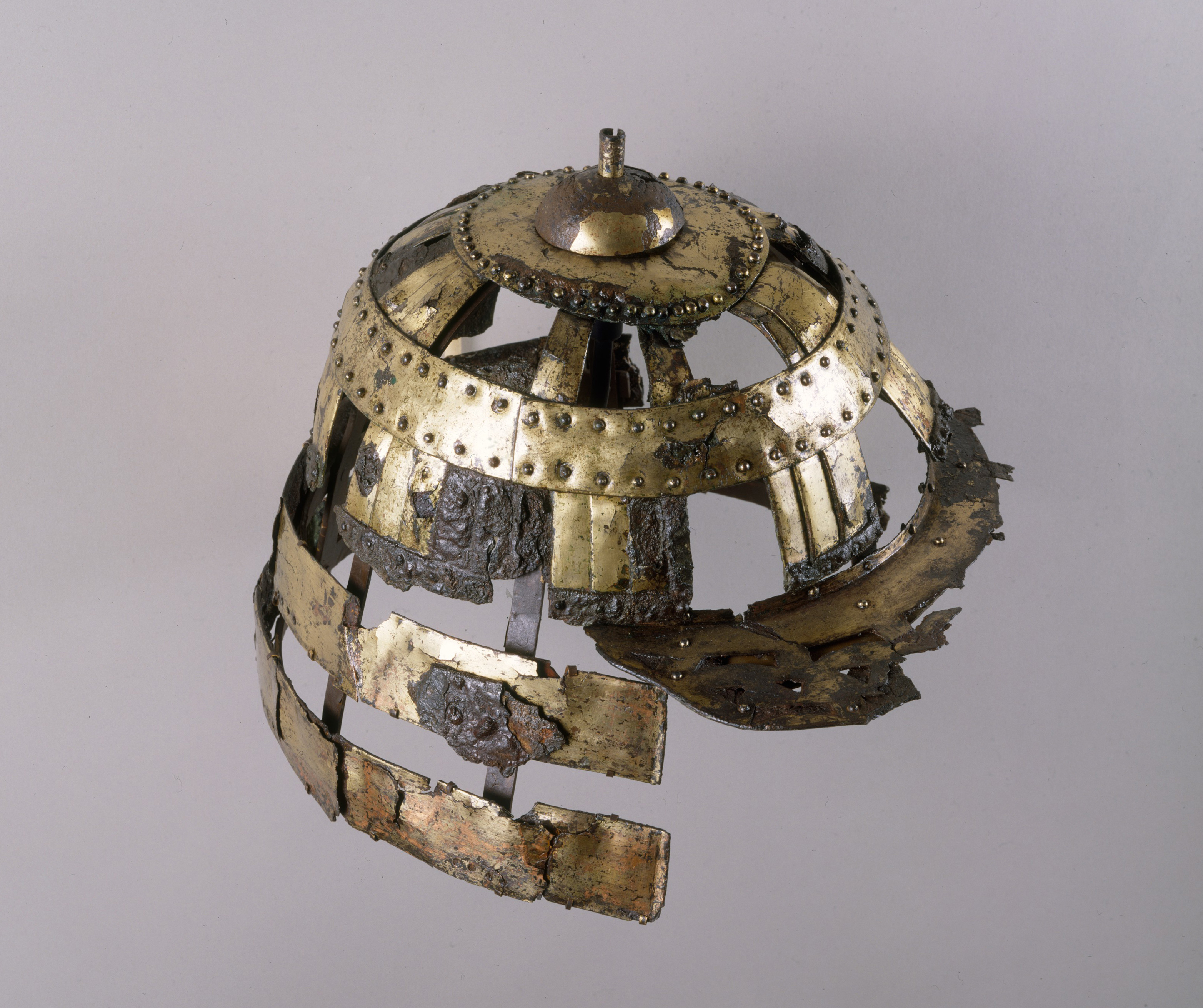 Japanese; Helmet; Helmets